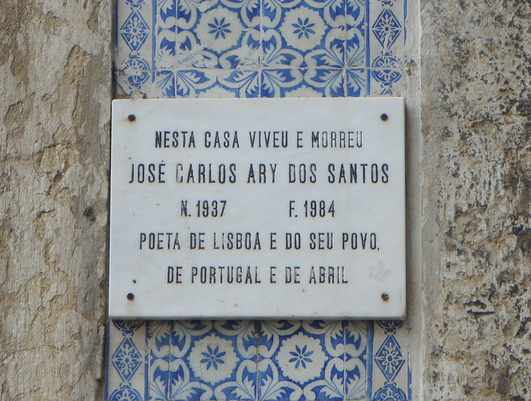 Placa identificando a casa onde viveu José Carlos Ary dos Santos